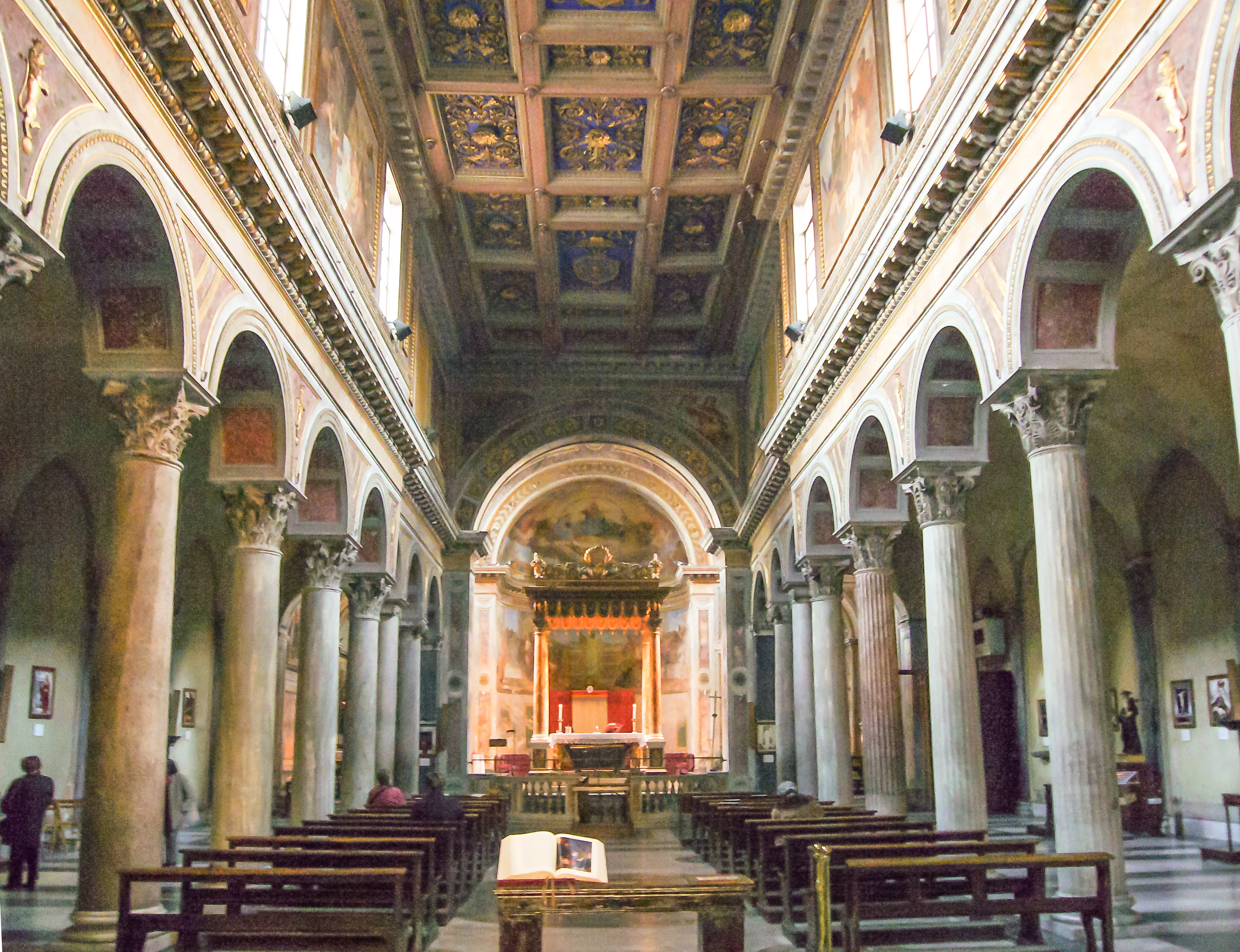 Roma, San Nicola in Carcere